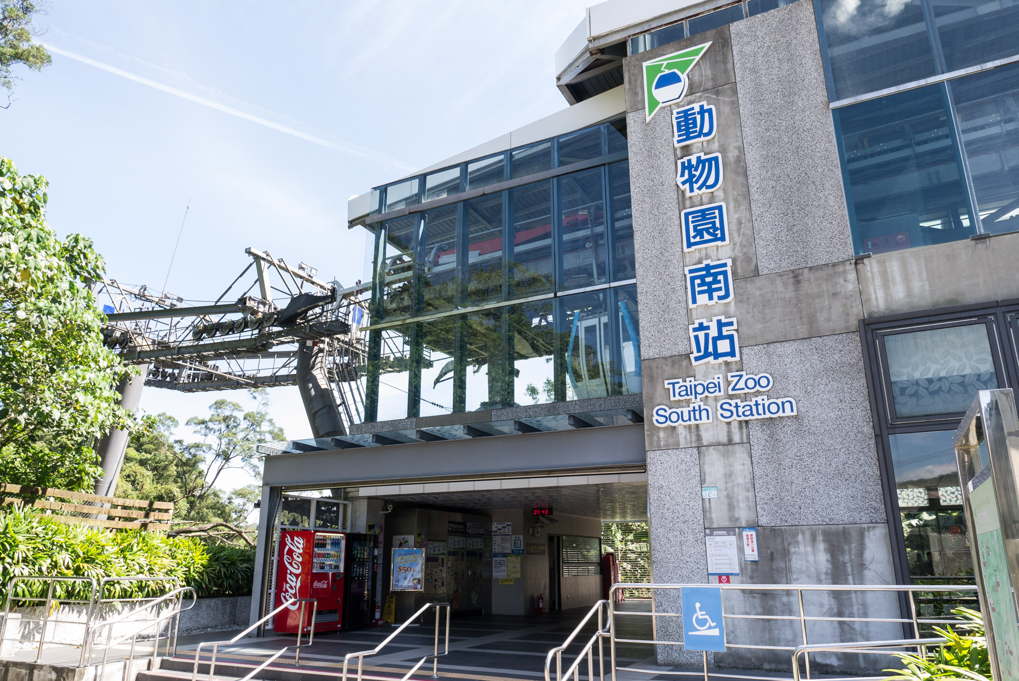 動物園南站